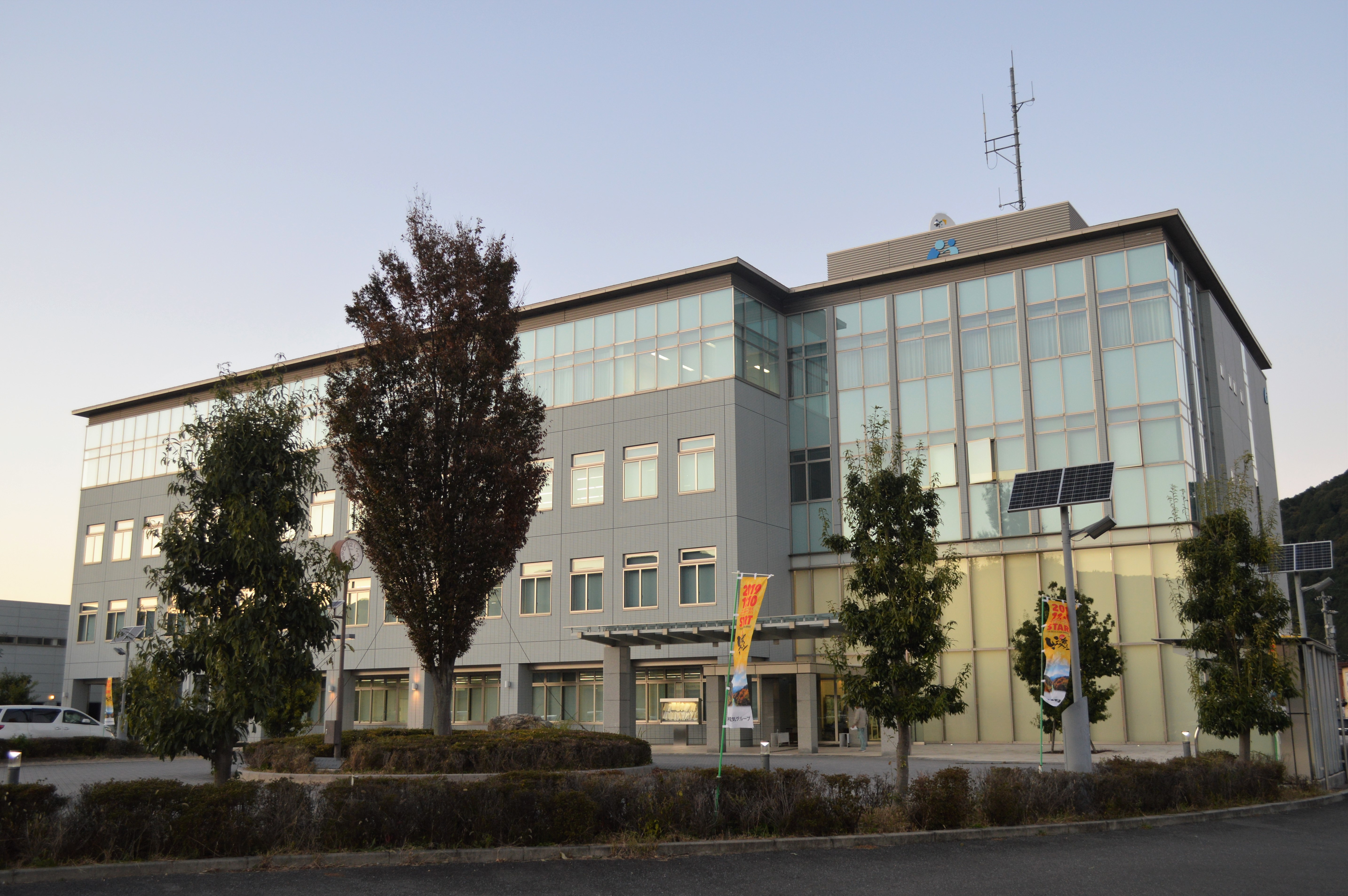 岐阜県揖斐郡揖斐川町にある揖斐川町役場。